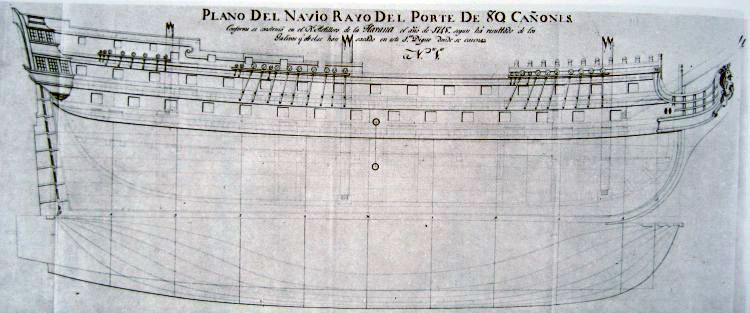 Dirección completa de la ubicación en la Real Biblioteca